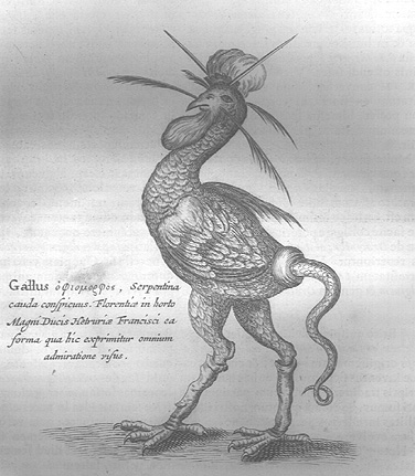 Monstrous rooster - an illustration from "Nowe Ateny", published 1745. A copy of woodcut by Aldrovandi